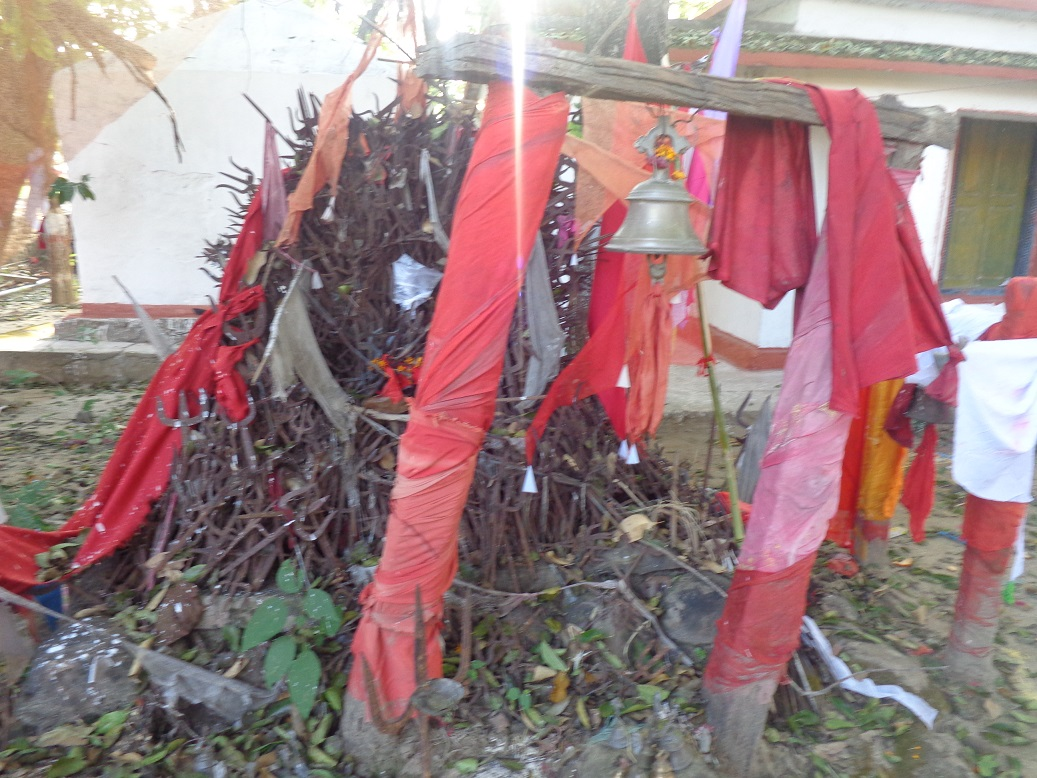 नेपाल भाषा: Gwashi samaiji dewata